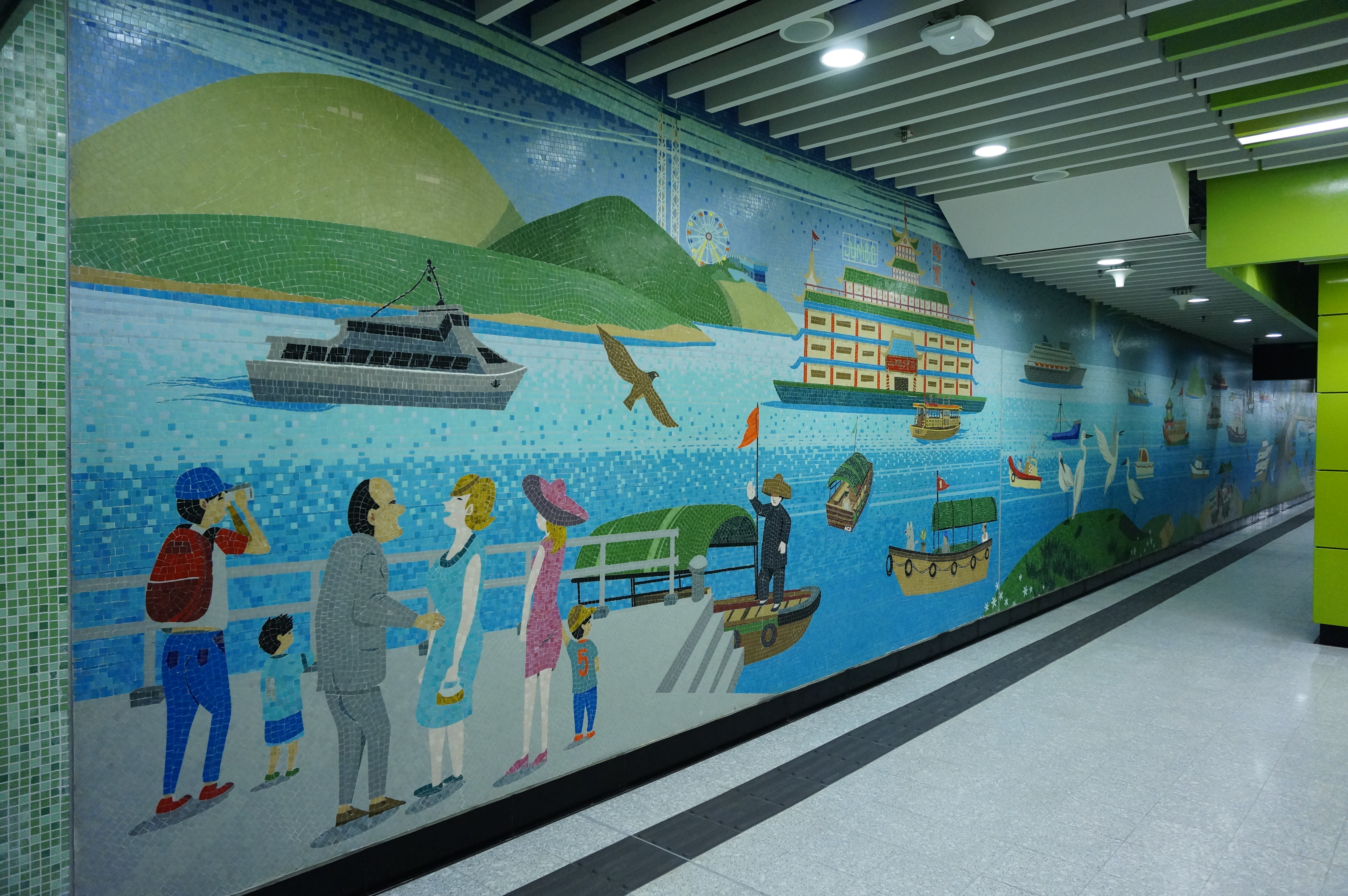 港鐵海怡半島站